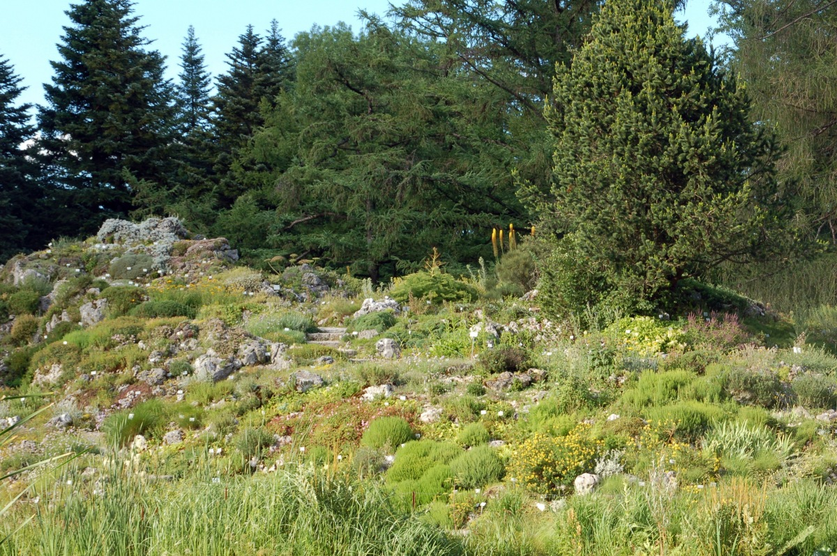 Botanischer Garten München-Nymphenburg, Bayern, Deutschland